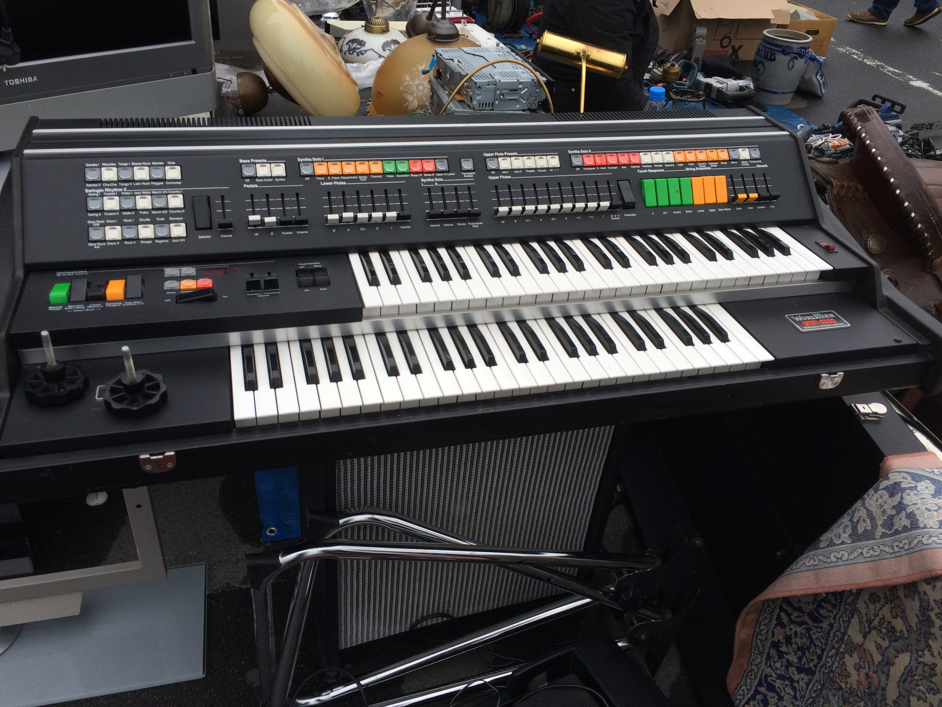 Wurlitzer Omni 6500